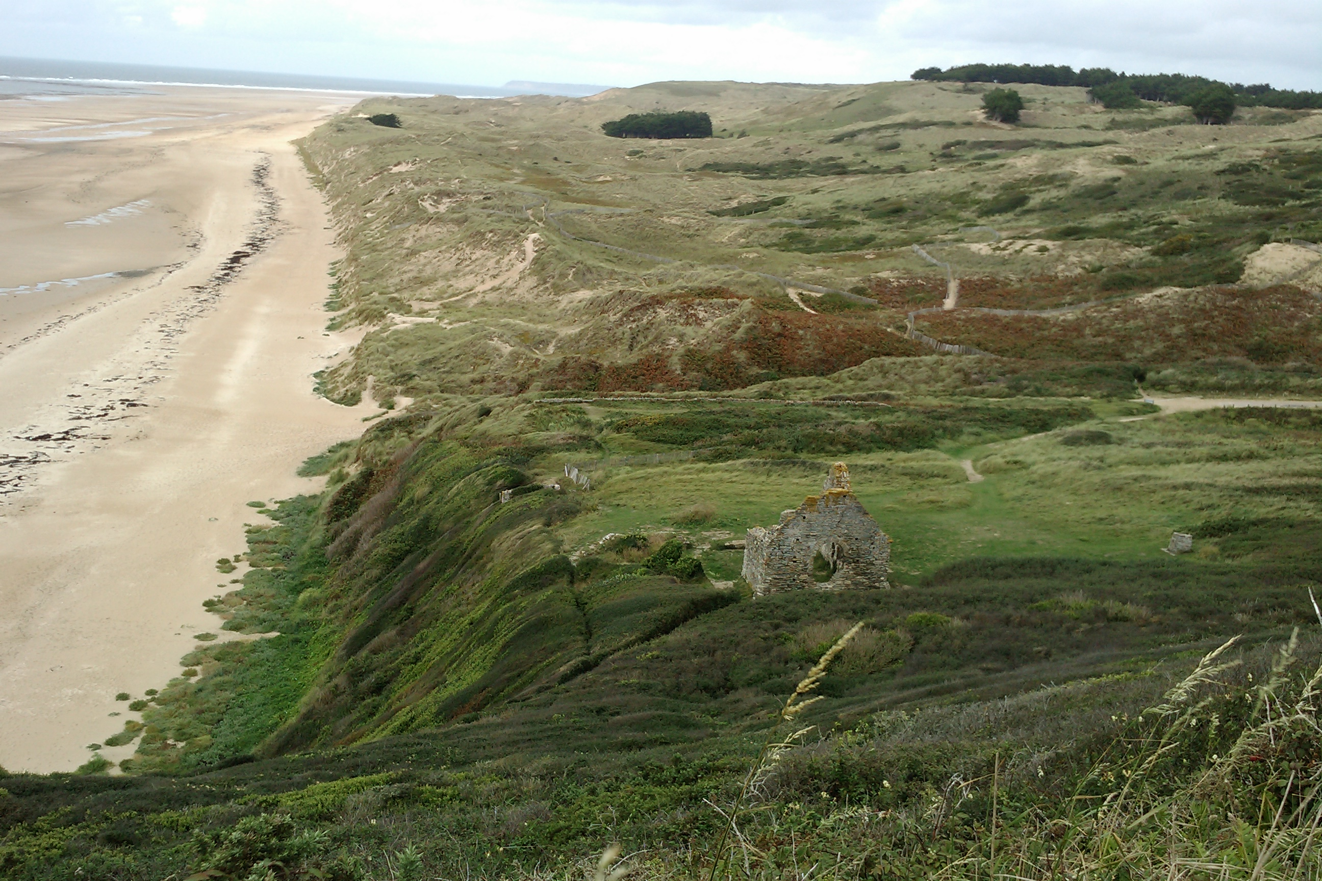 ruines de la vielle église Saint-Germain le Scot dans les dunes